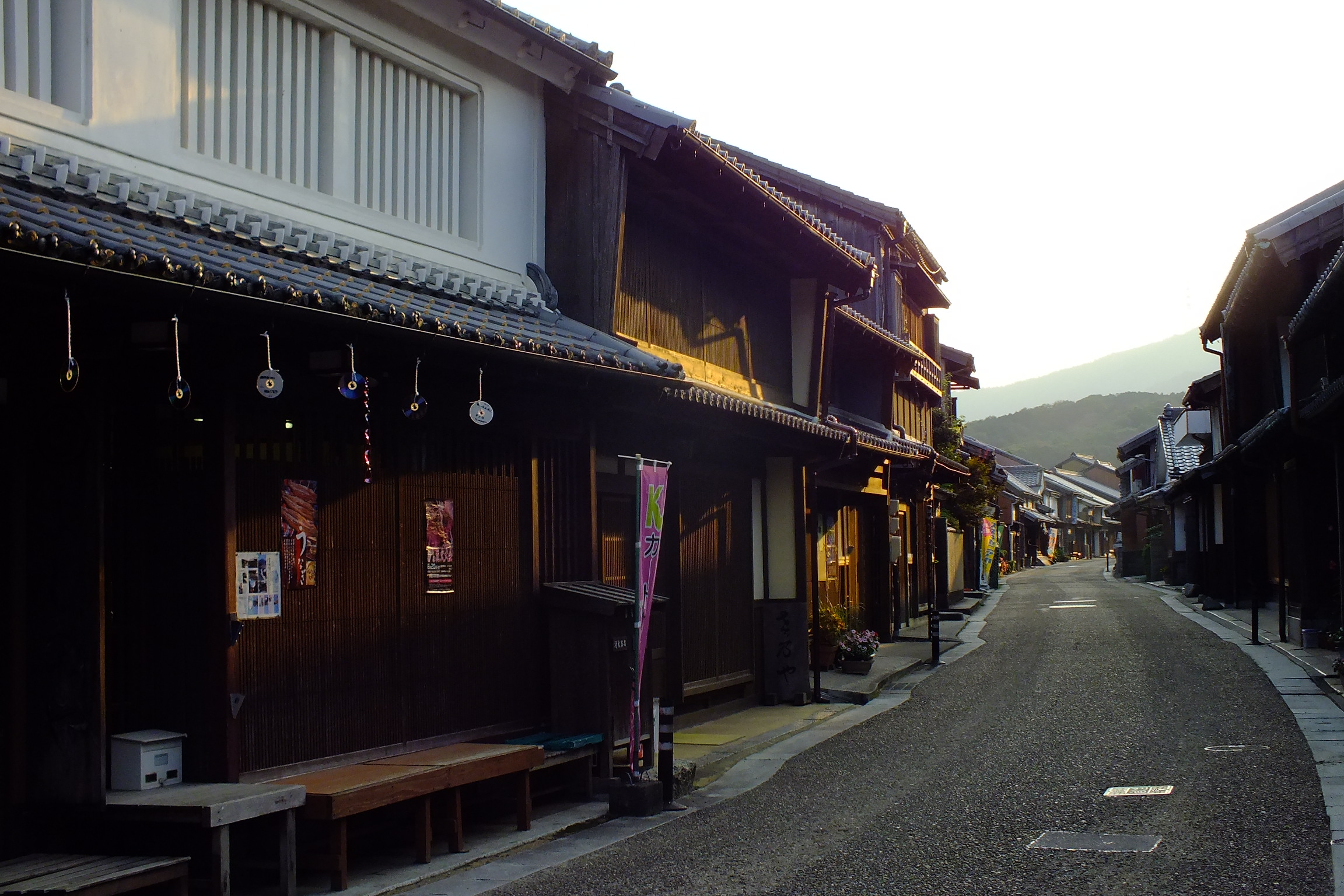 2016-08-05 Tokaido Seki Juku Kameyama City Mie,東海道五十三次 関宿